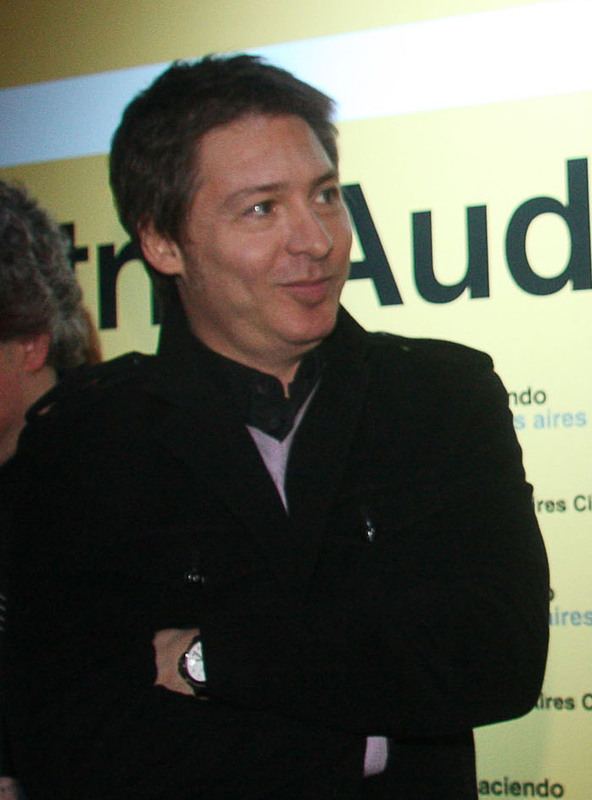 Adrrían Suar junto a Mauricio Macri y Gaston Portal.